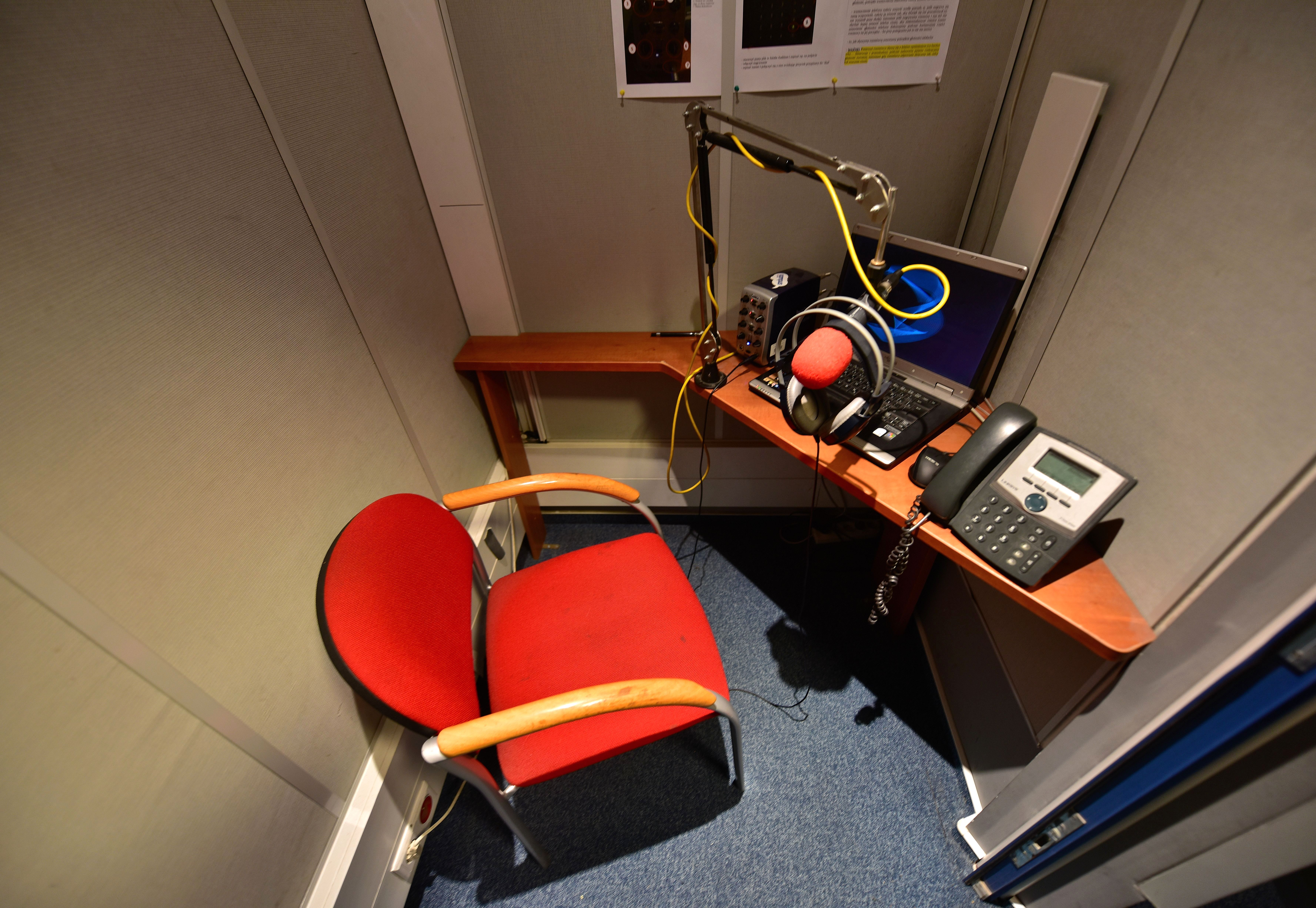 Akademickie Radio Kampus w Warszawie. Studio "C"